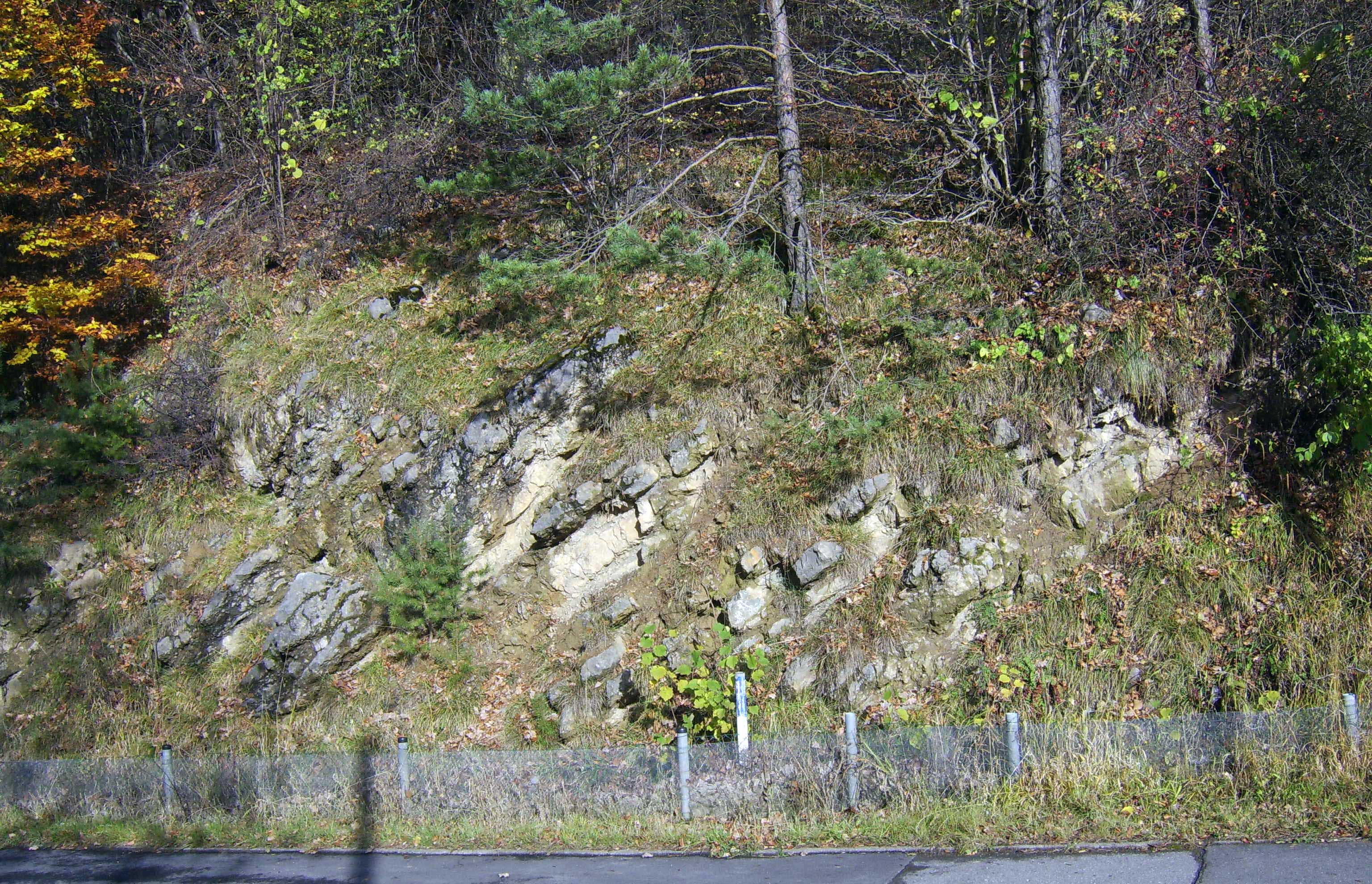 Marmagen, geologischer Aufschluss Wahlenerstraße